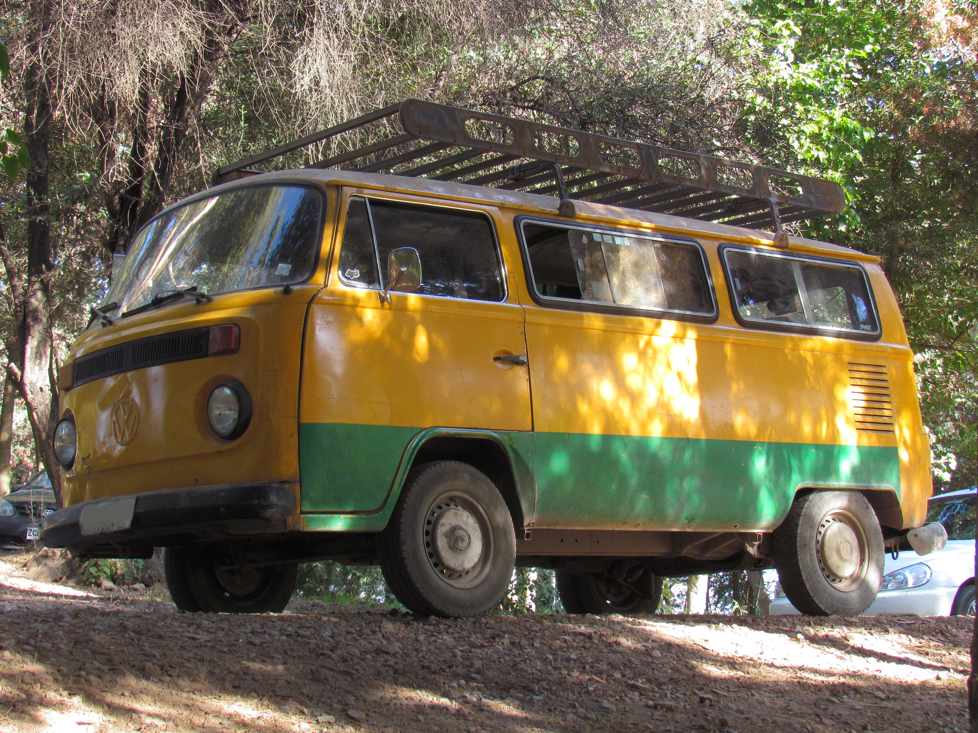 brazilian T2